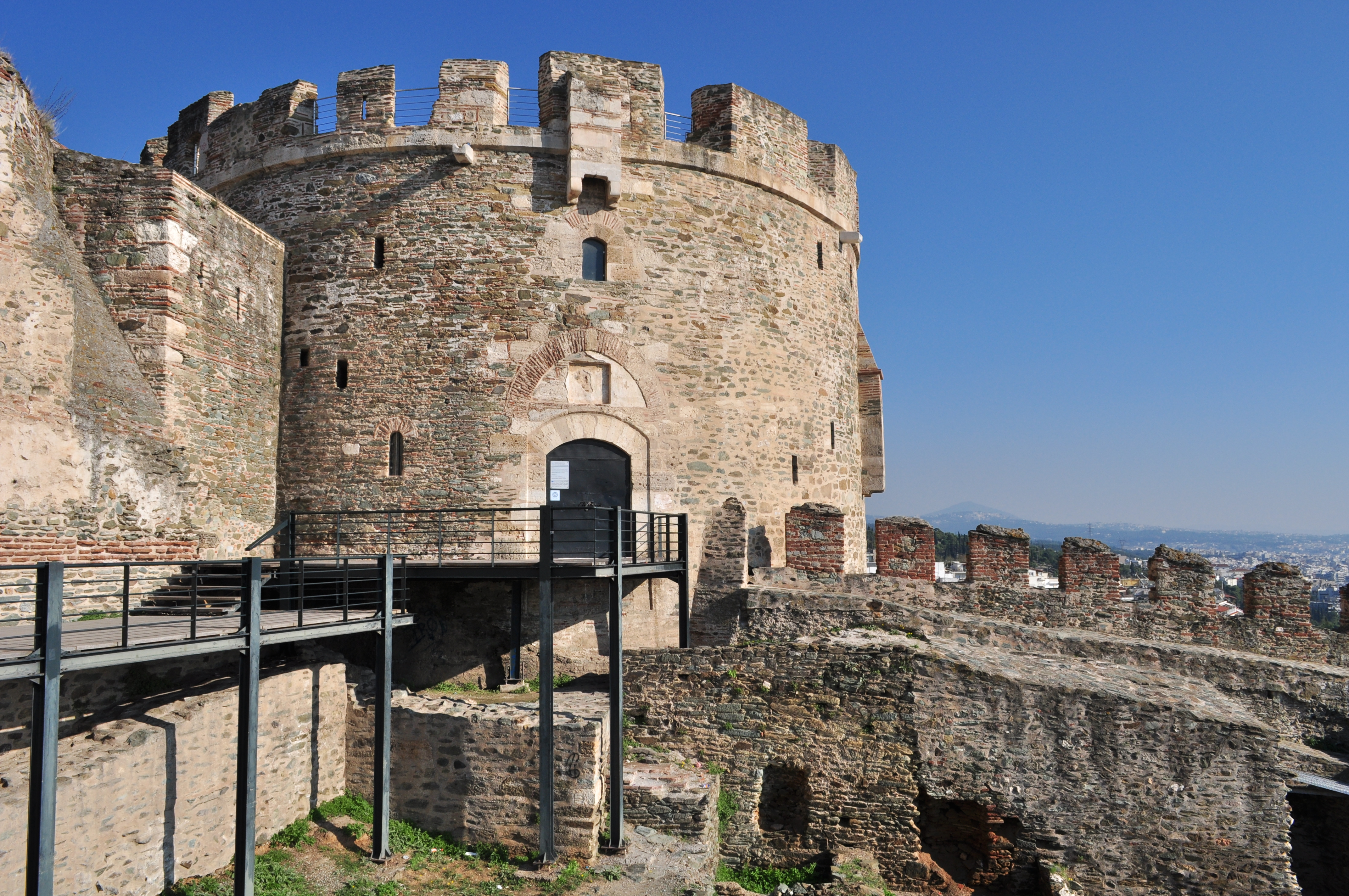 Blandt andet oppe ad bjerget nord for byen er bevaret store dele af Thessalonikis bymur fra oldtiden